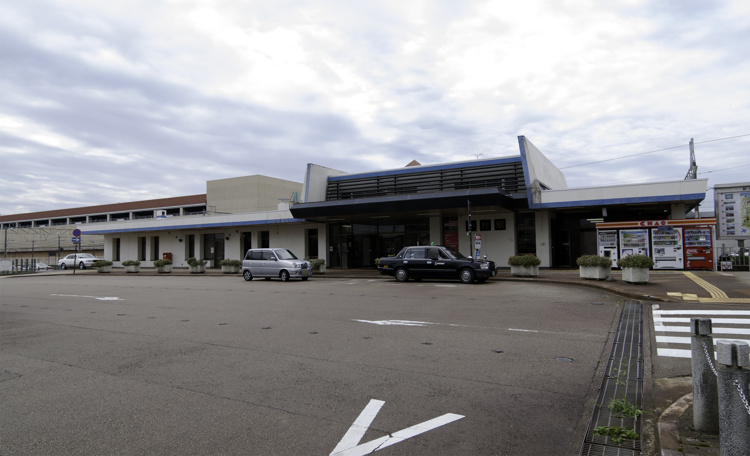 西日本旅客鉄道株式会社北陸本線小杉駅駅舎